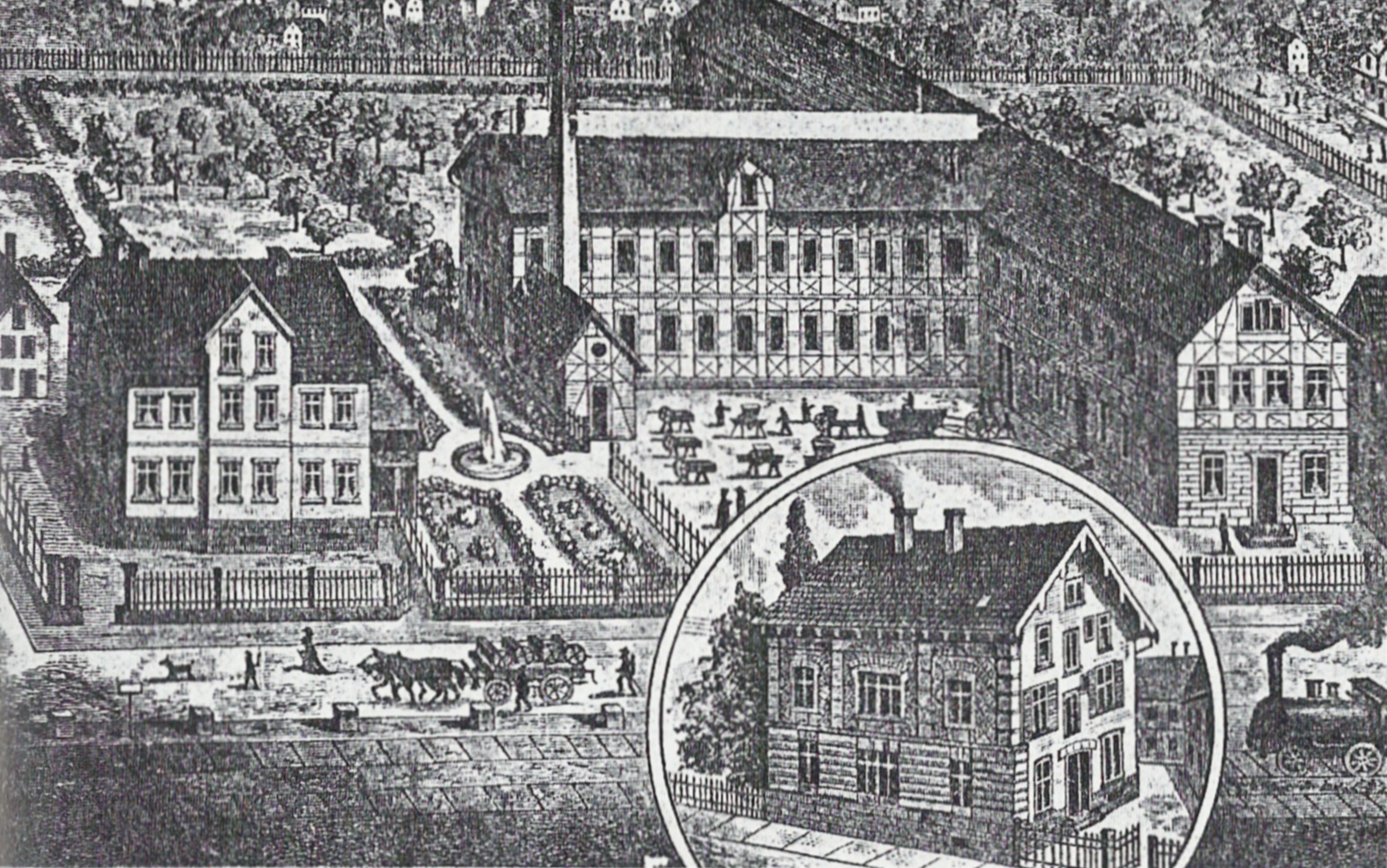 Ausschnitt aus einem Prospekt der Maschinenfabrik Karl Eheim. Das rechte Gebäude ist die die Maschinenfabrik Karl Eheim, links das Kottmannsche Anwesen. In der Bildmitte die Weippertsche Elektrizitätszentrale (mit Schornstein).